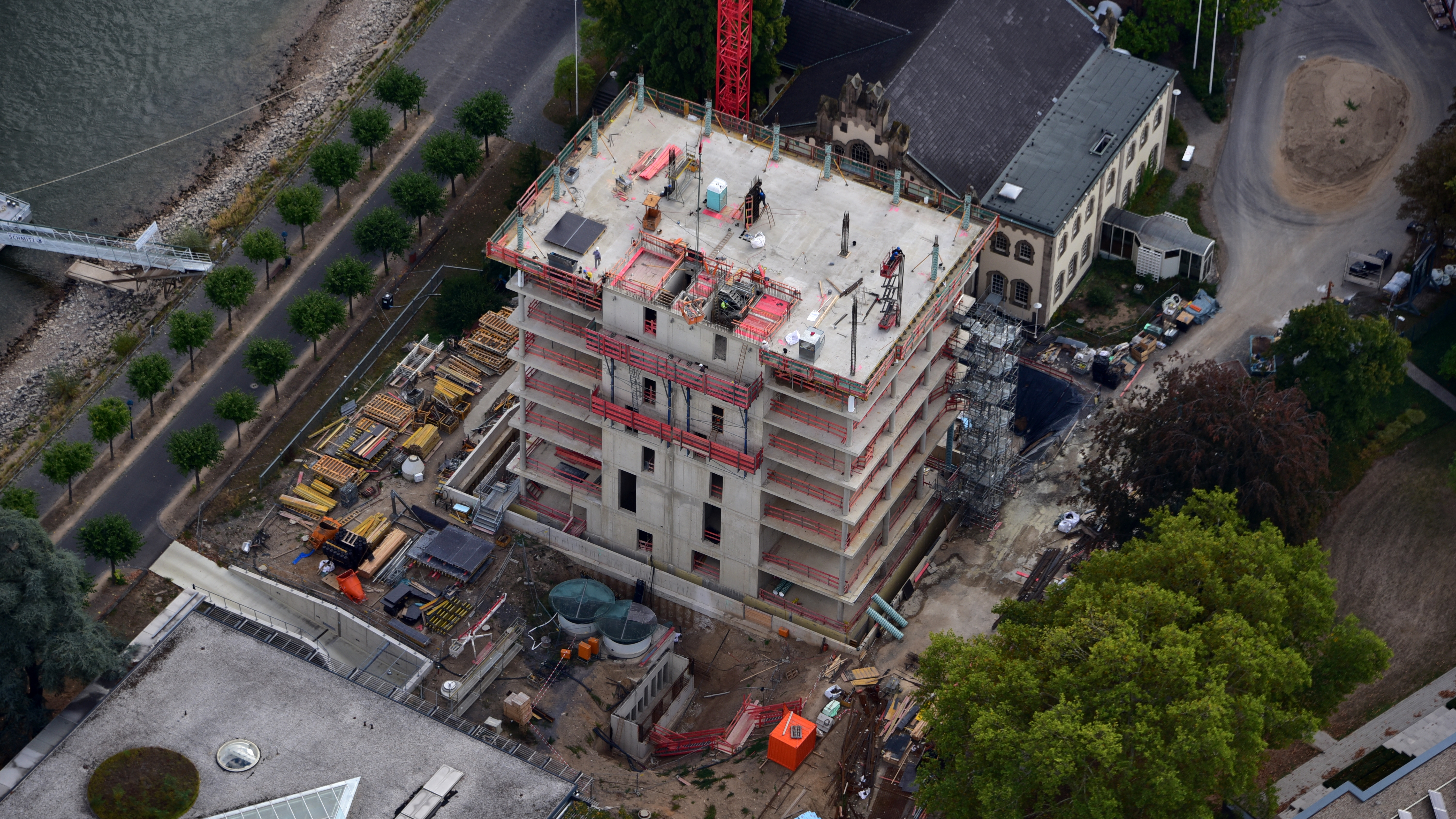 Bautenstand September 2018, Luftaufnahme